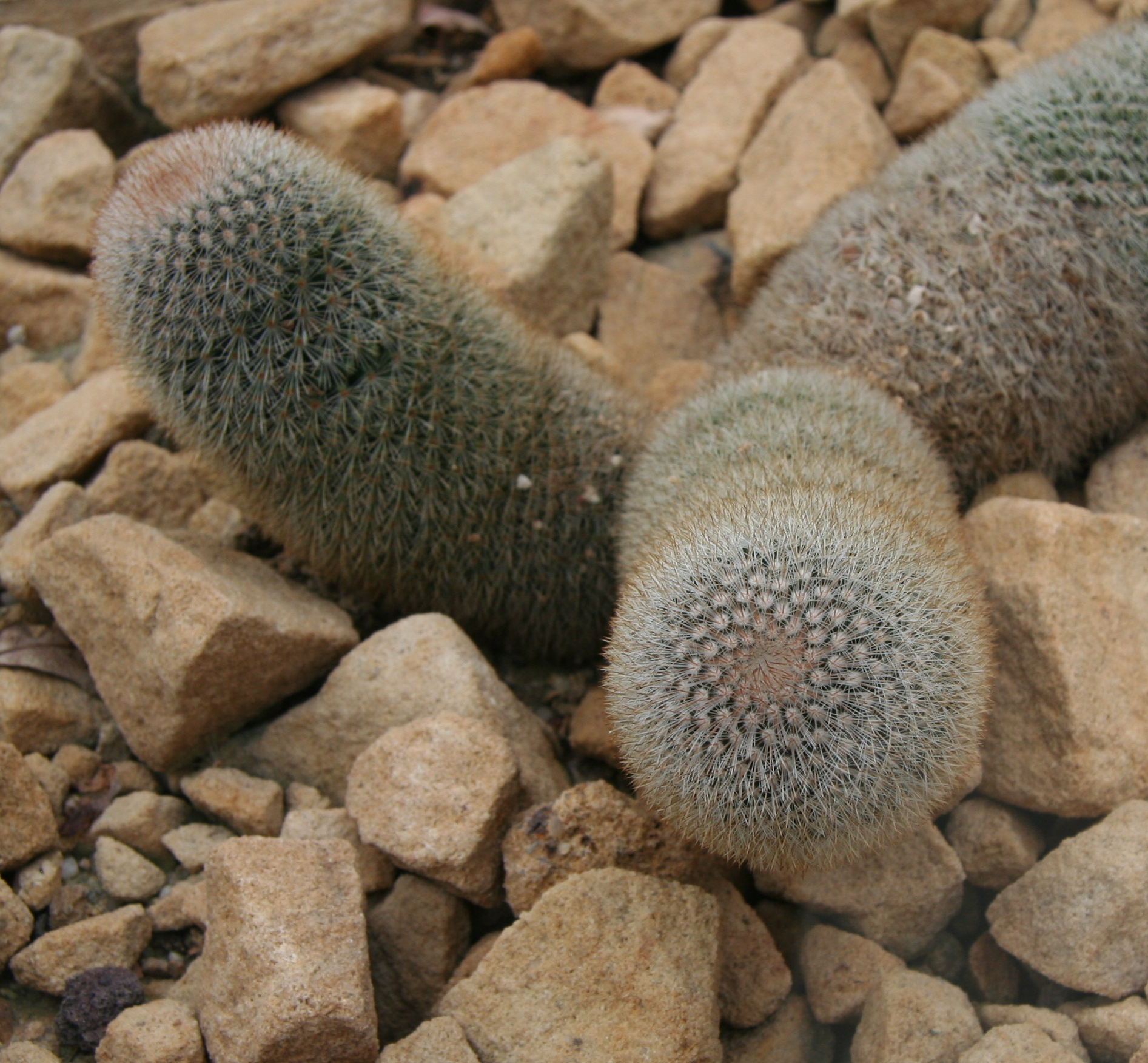 Mammillaria meyranii im Botanischen Garten Dresden